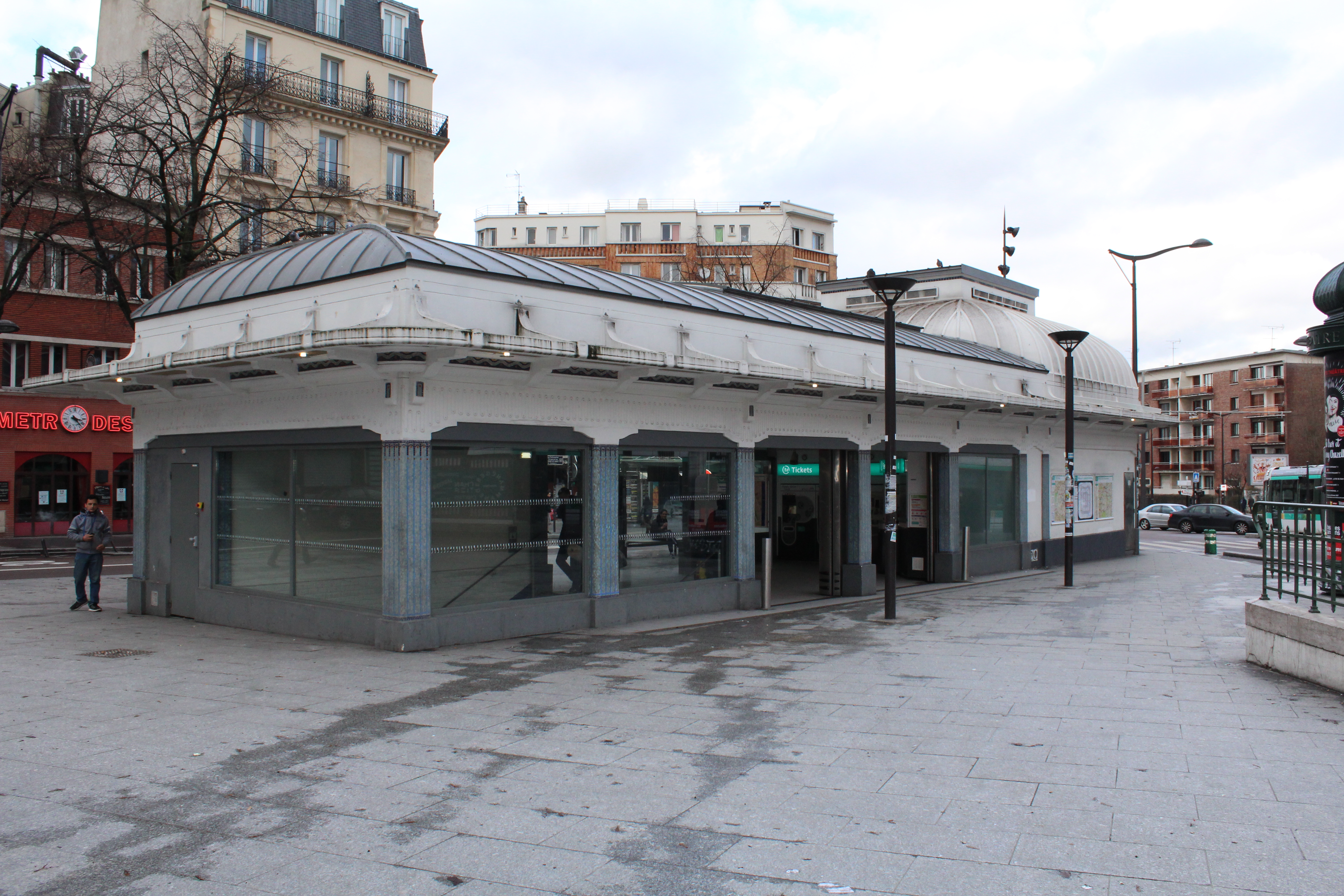 Bâtiment à d'entrée de la station de métro Porte des Lilas à Paris.